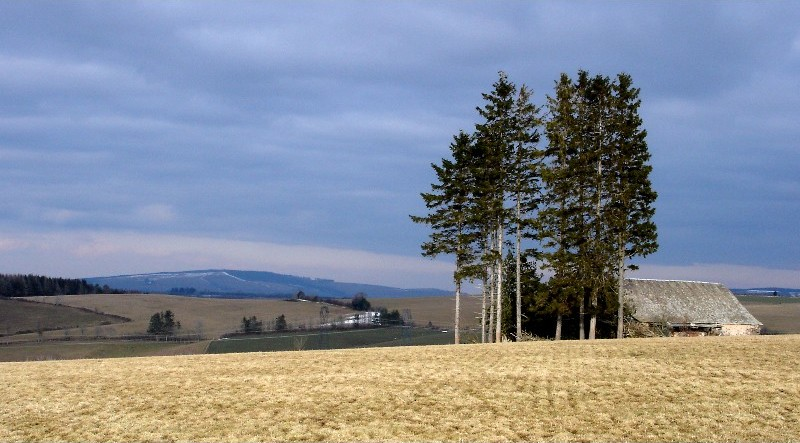 Le Lévézou